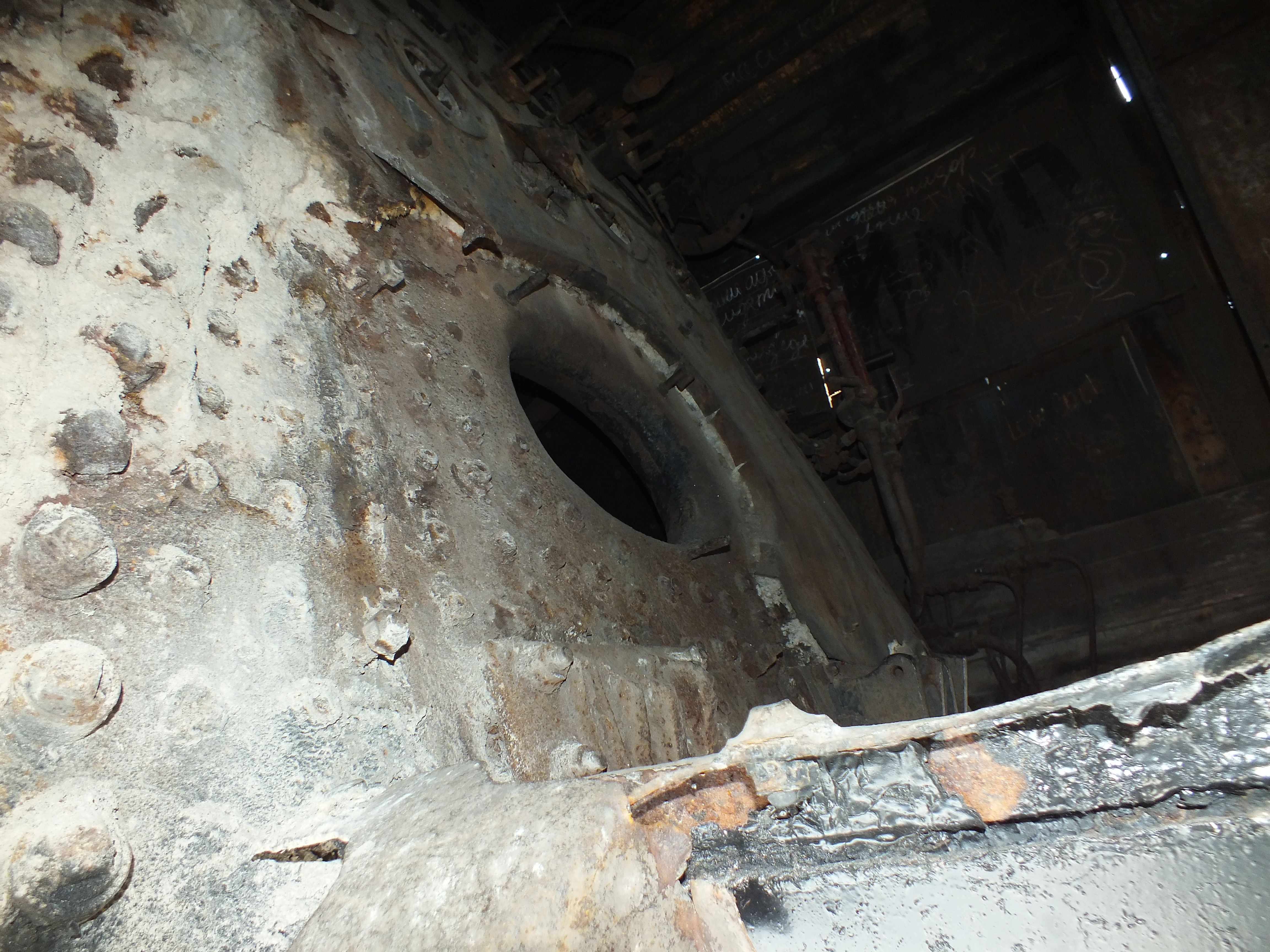 Russian locomotive Ел-629